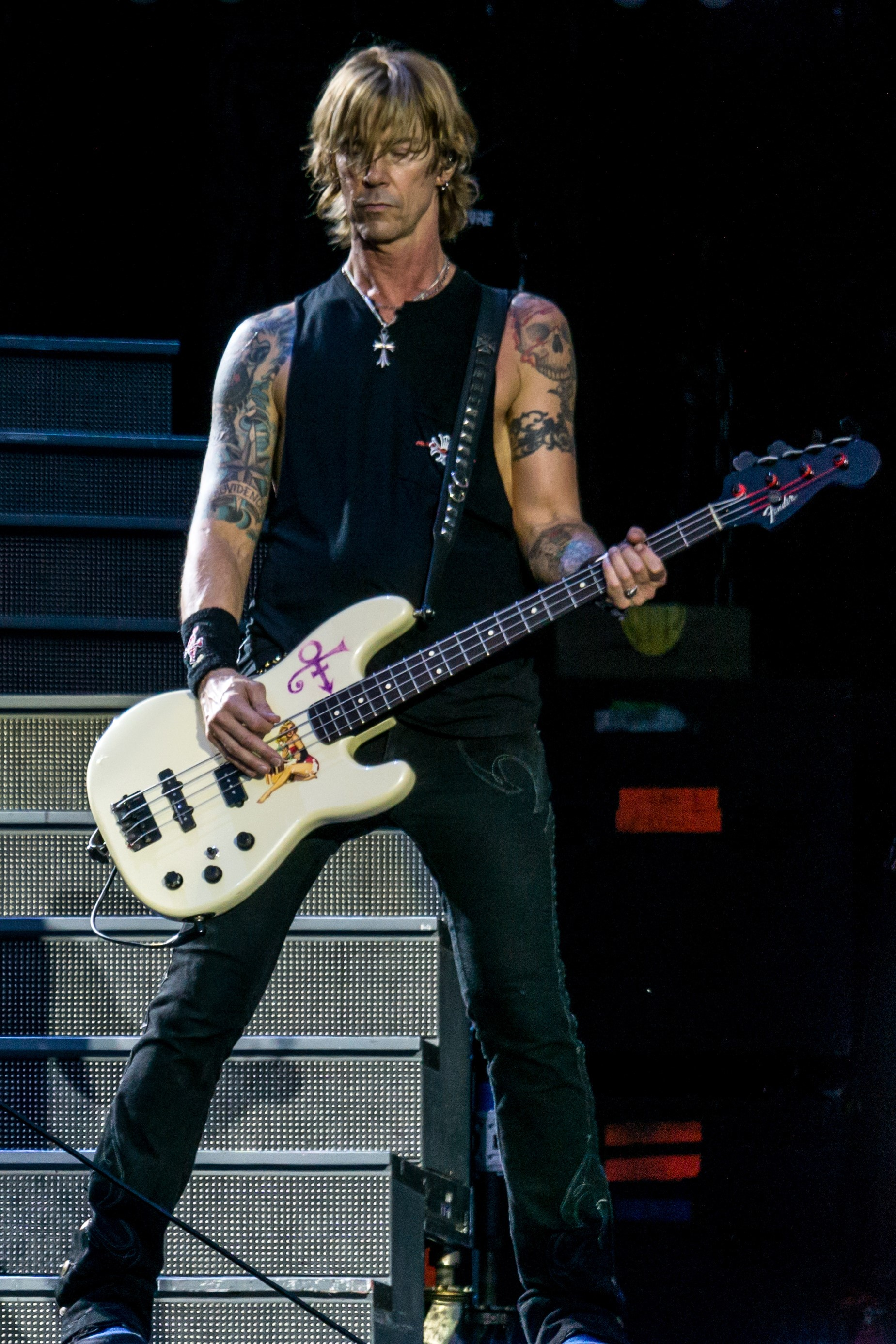 GunsNRoses160617-30